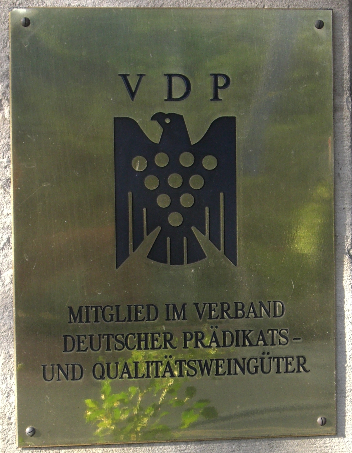 Hinweisschild eines Weinguts auf dessen Mitgliedschaft im Verband Deutscher Prädikats- und Qualitätsweingüter